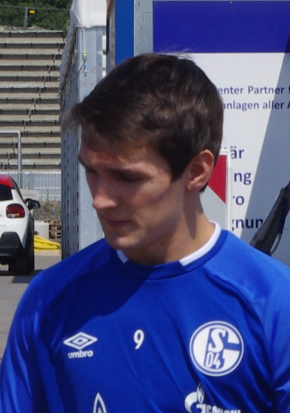 Benito Raman vor seinem ersten Training auf Schalke